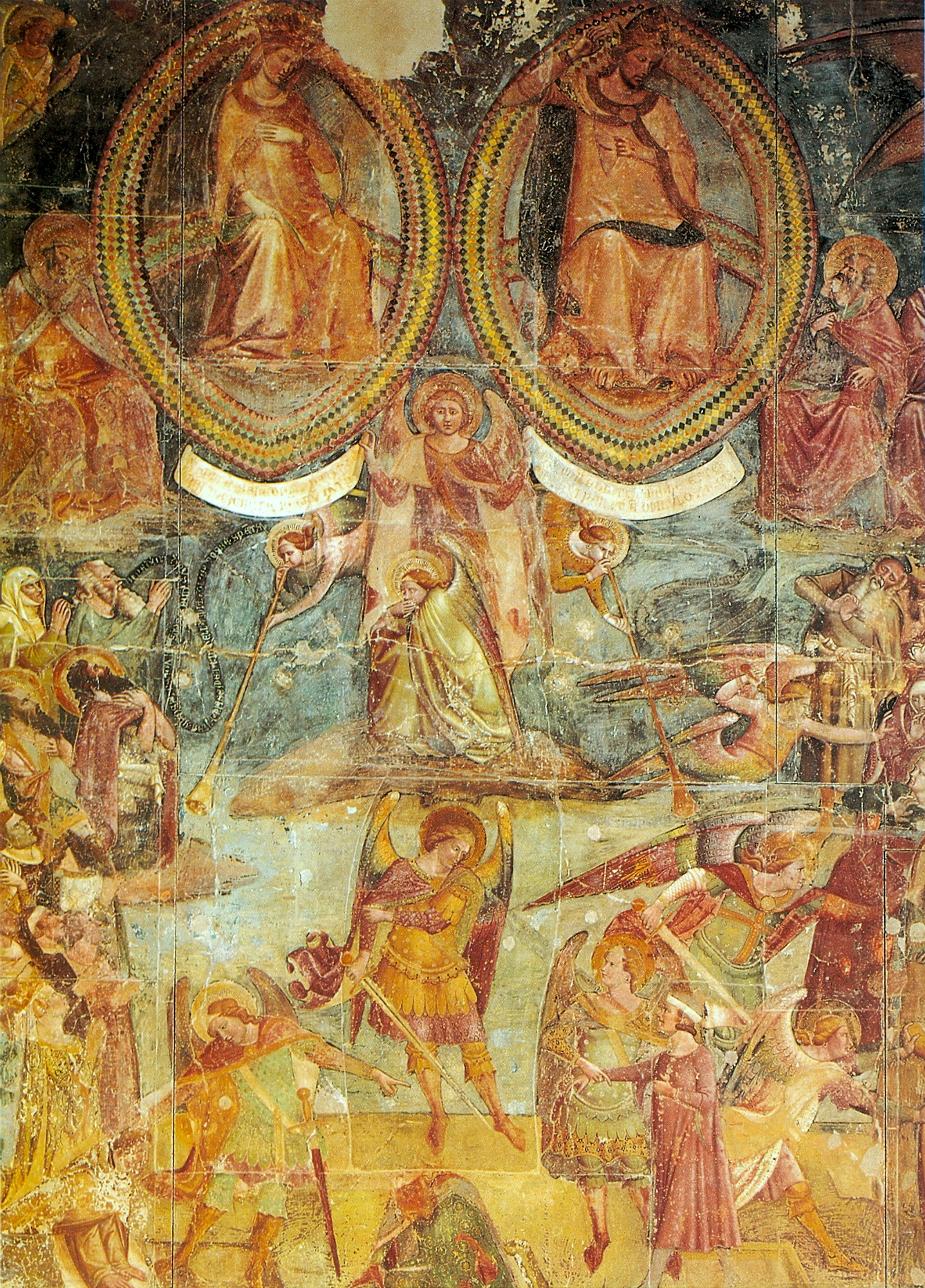 Buonamico_buffalmacco_Camposanto.jpg